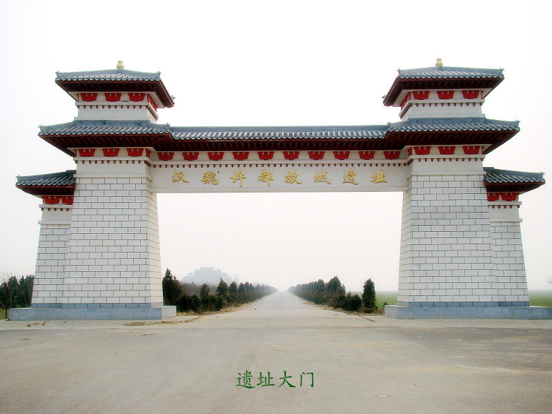 中文（中国大陆）: 汉魏故城位于许昌县张潘镇古城村，距许昌市18公里。